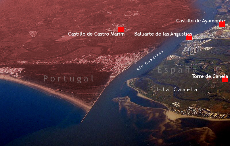 Ubicación de las fortificaciones en la desembocadura del río Guadiana. España y Portugal.